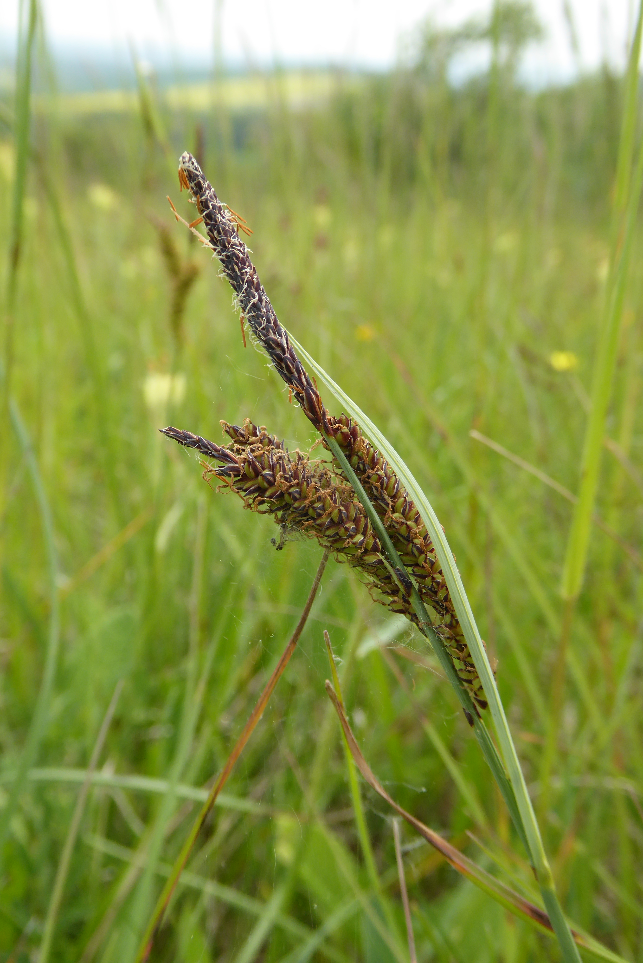 Blaugrüne Segge (Carex flacca) auf der Aschenburg bei Harste, Flecken Bovenden, Südniedersachsen